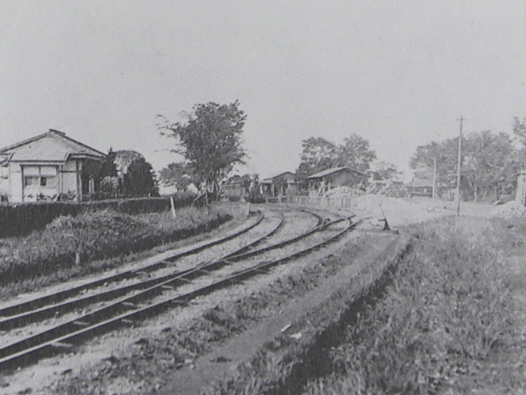 1909年（明治42年）ごろの東村山停車場風景。